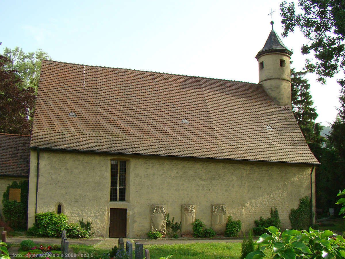 Friedhofskirche in Forchtenberg, einst Kirche des abgegangenen Ortes Wülfingen und Urkirche des Kirchensprengels im dortigen Kochertal